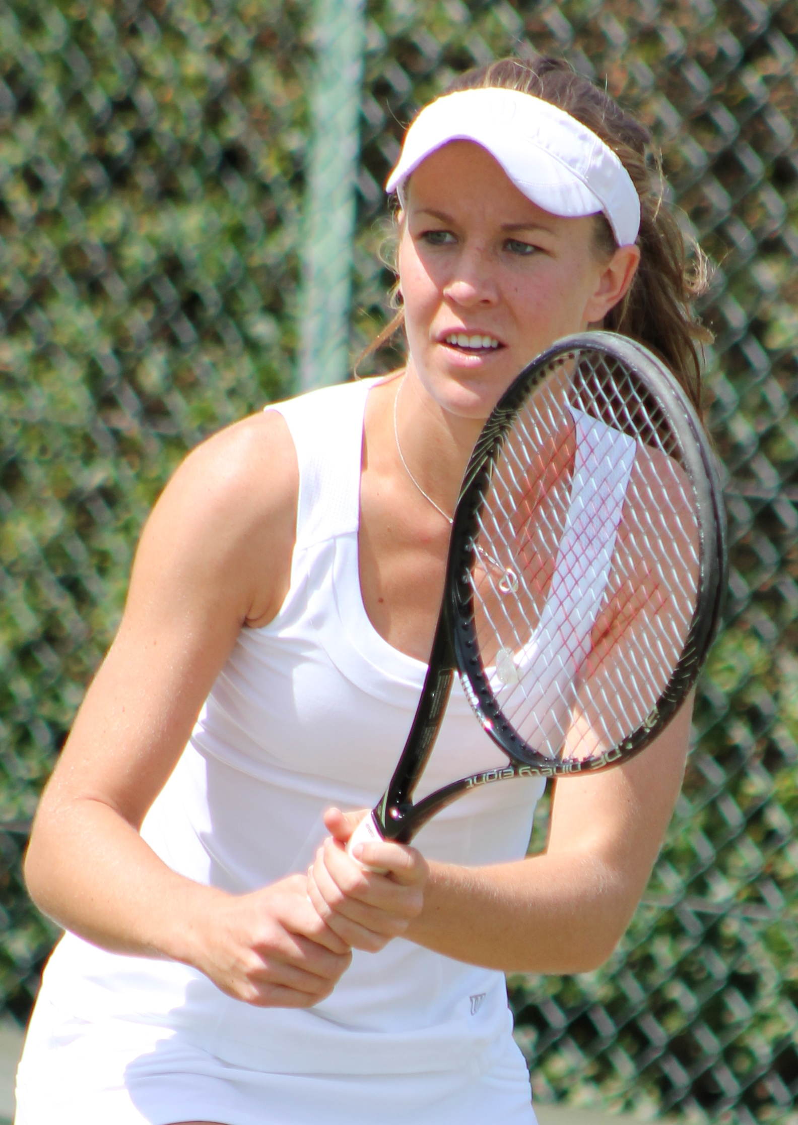 Rogowska WMQ14 (5)